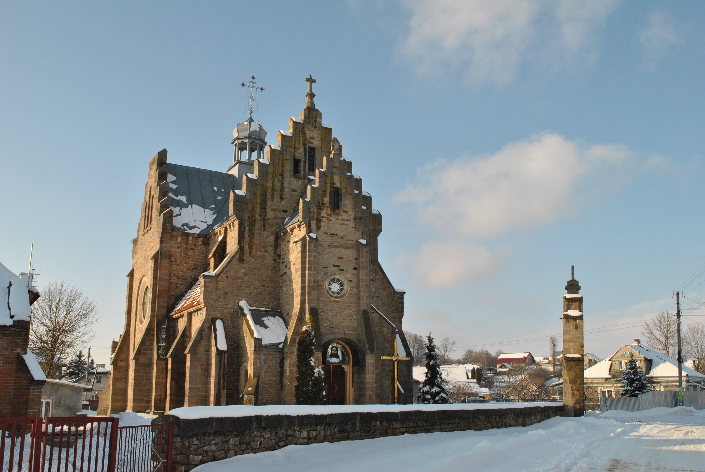 Церква святих апостолів Петра і Павла УПЦ КП (колишній костел) у селі Буцневі Тернопільського району Тернопільської області (Україна).